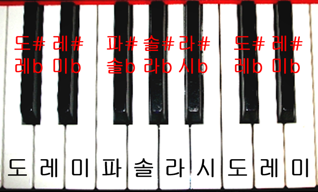 피아노 건반과 그에 해당하는 계이름